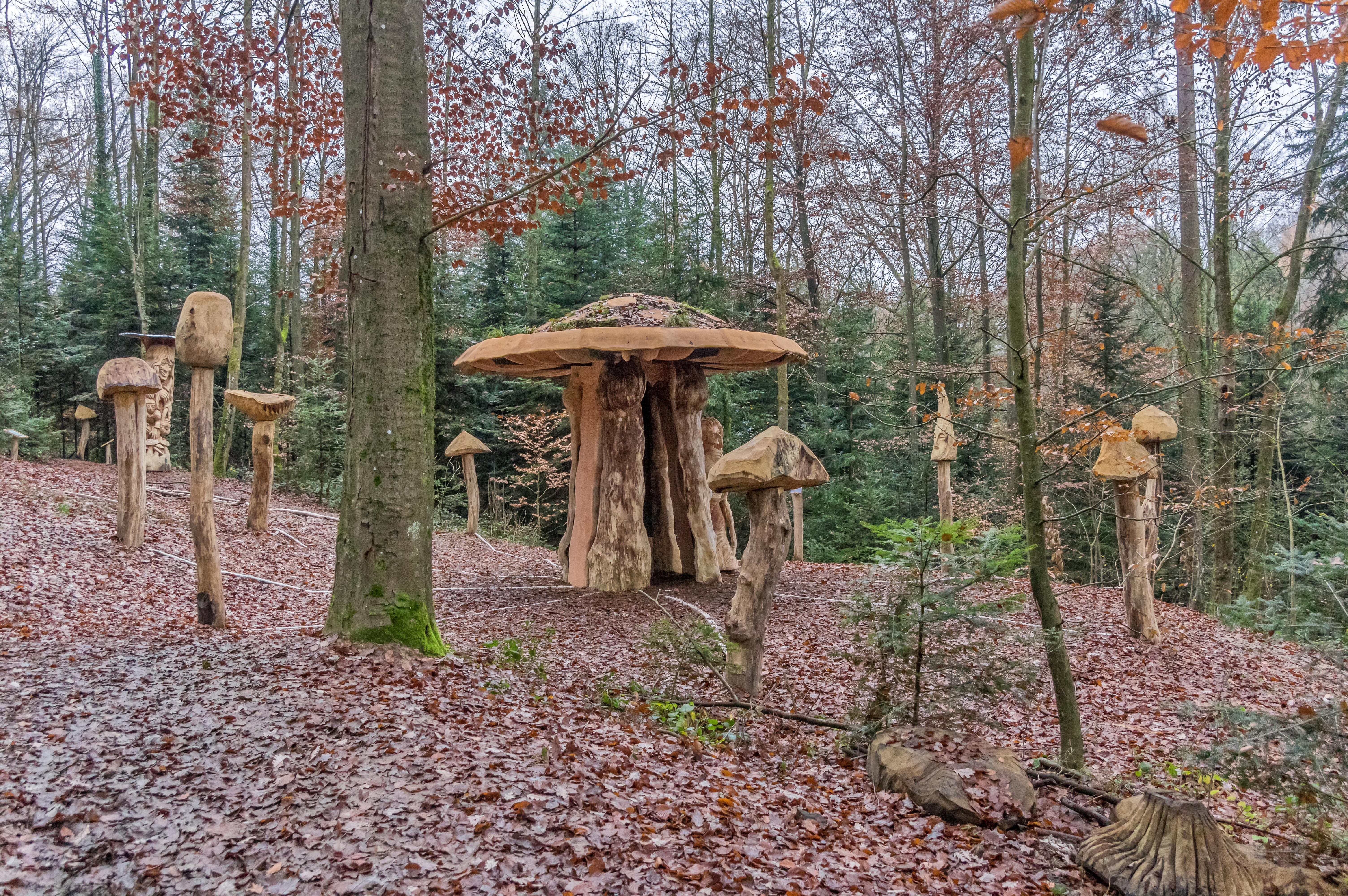 Bilder aus Freiburg im Breisgau, hier aus dem Arboretum Thomas Rees, Figur aus der Serie Hexenring 2014 Der Hexenring